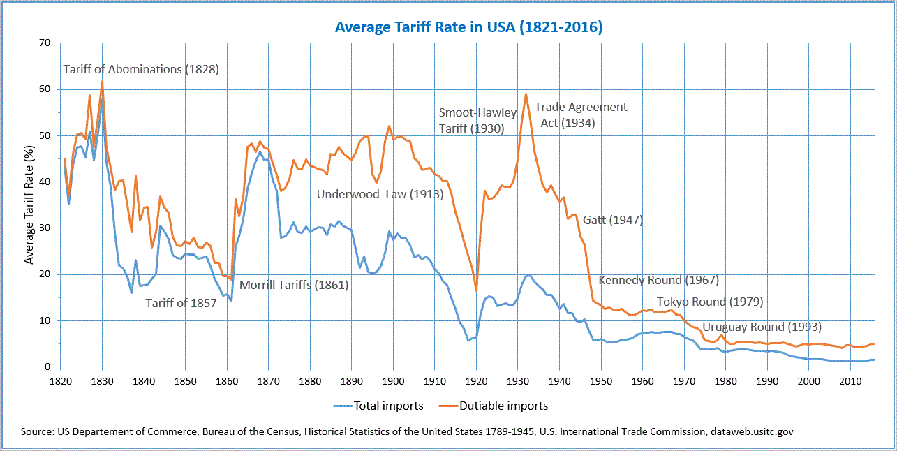 Average Tariff Rate in USA (1821-2016)